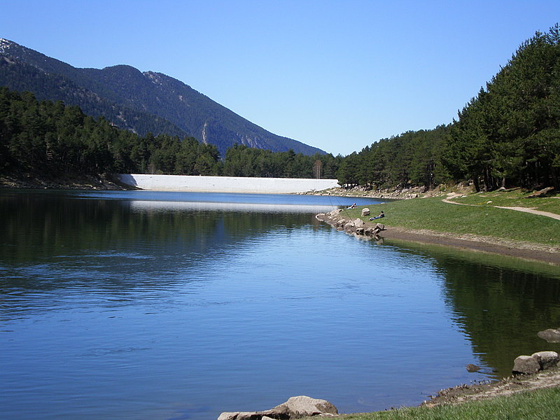 Llac d´Engolasters, Andorra´07